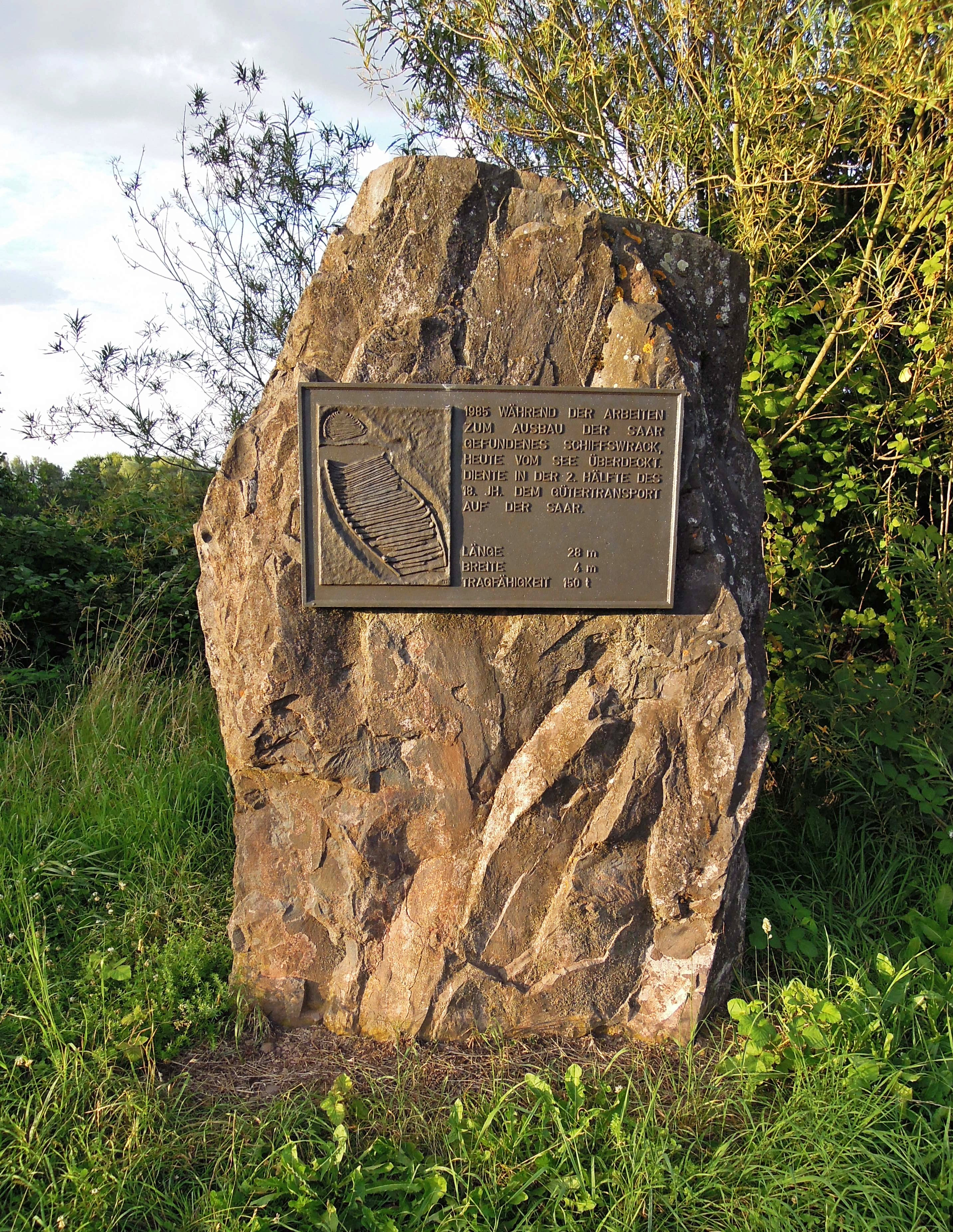 Gedenkstein für ein 1985 bei der Kanalisierung der Saar gefundenen Schiff aus dem 18ten Jahrhundert; aufgestellt am Ökosee.